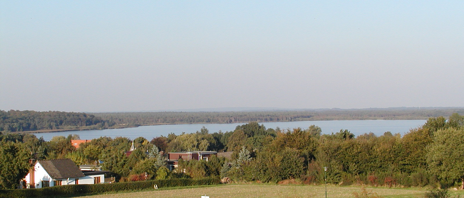 Der See aus der Ferne